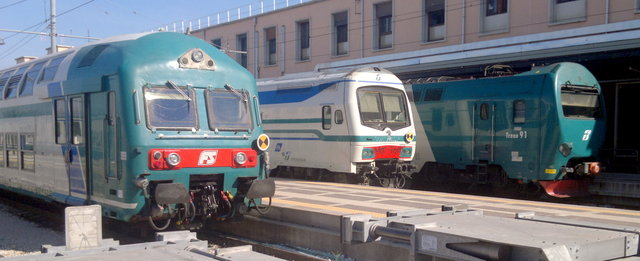 materiale rotabile 2 piani trenitalia